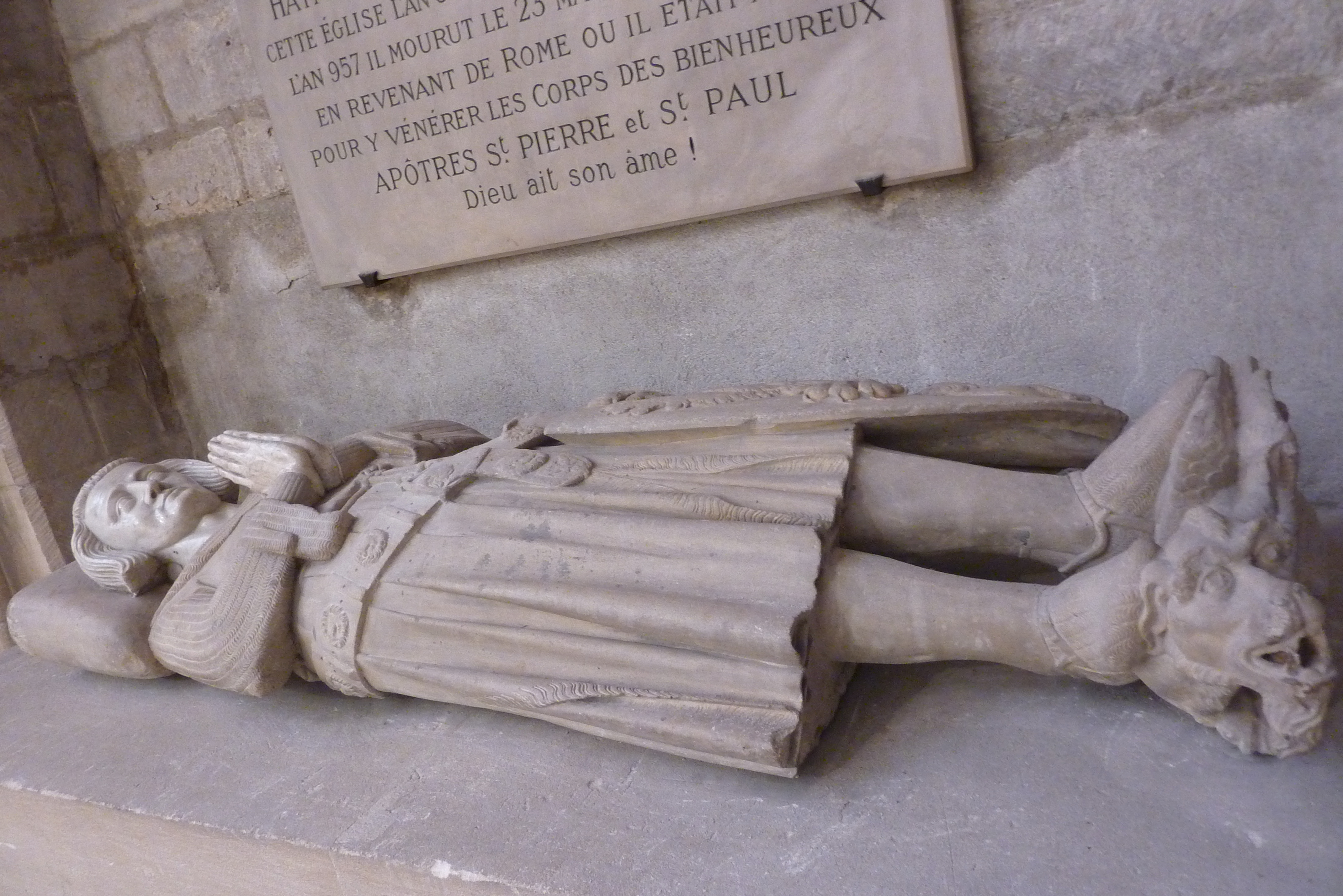 Kathedrale Saint-Spire in Corbeil-Essonnes im Département Essonne (Île-de-France), Liegefigur des Grafen Haymon